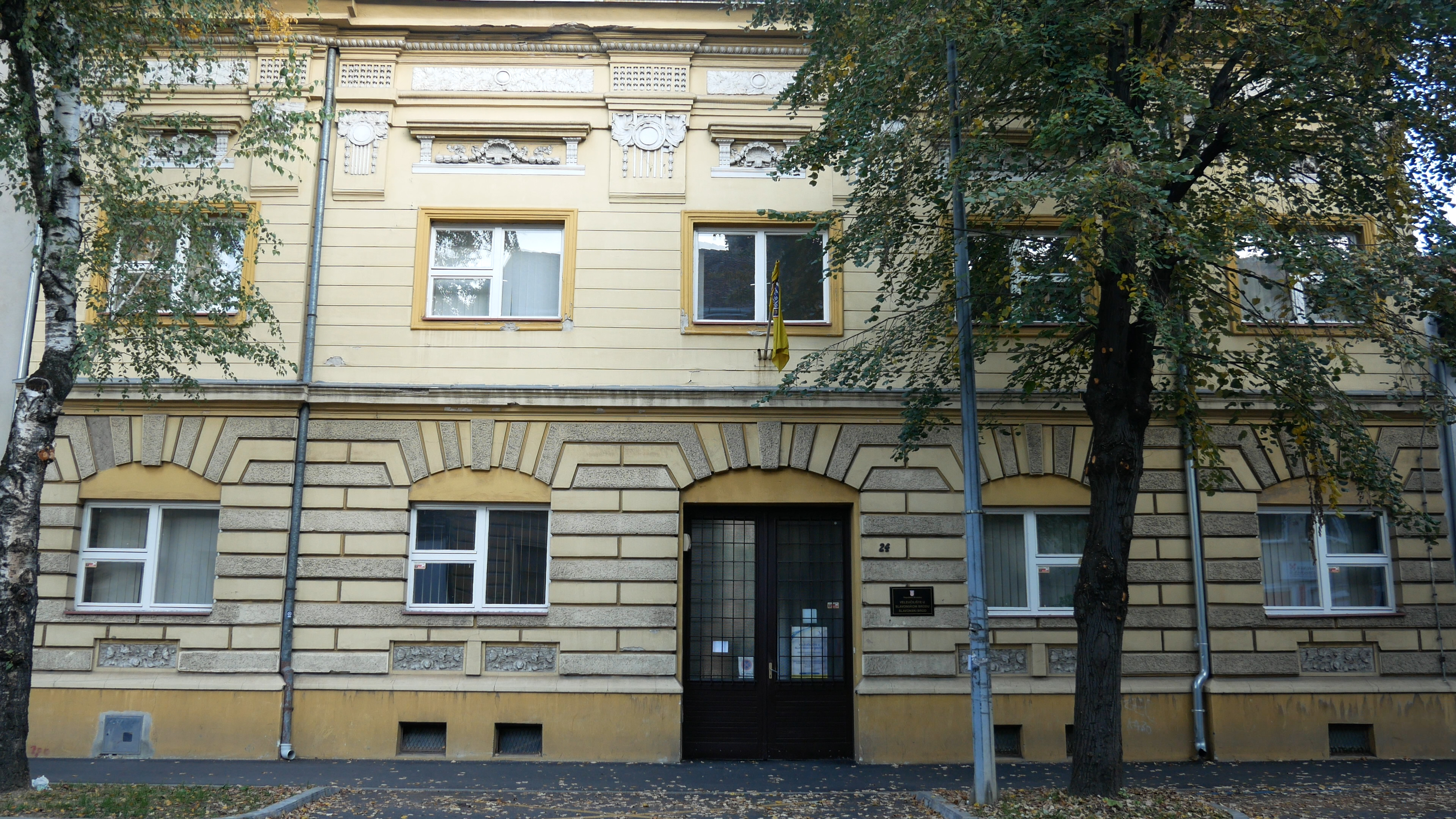 Secesijska zgrada Veleučilišta u Slavonskom Brodu